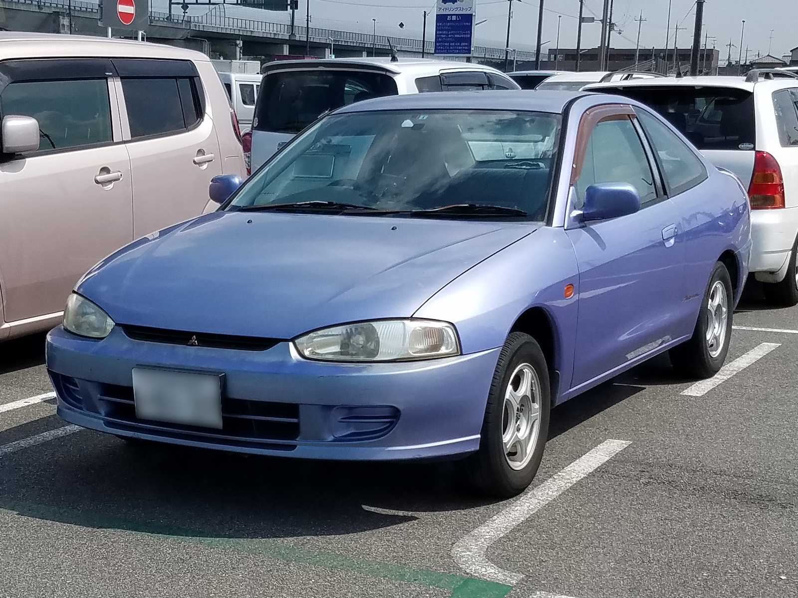 ミラージュアスティ マリオン(後期型)